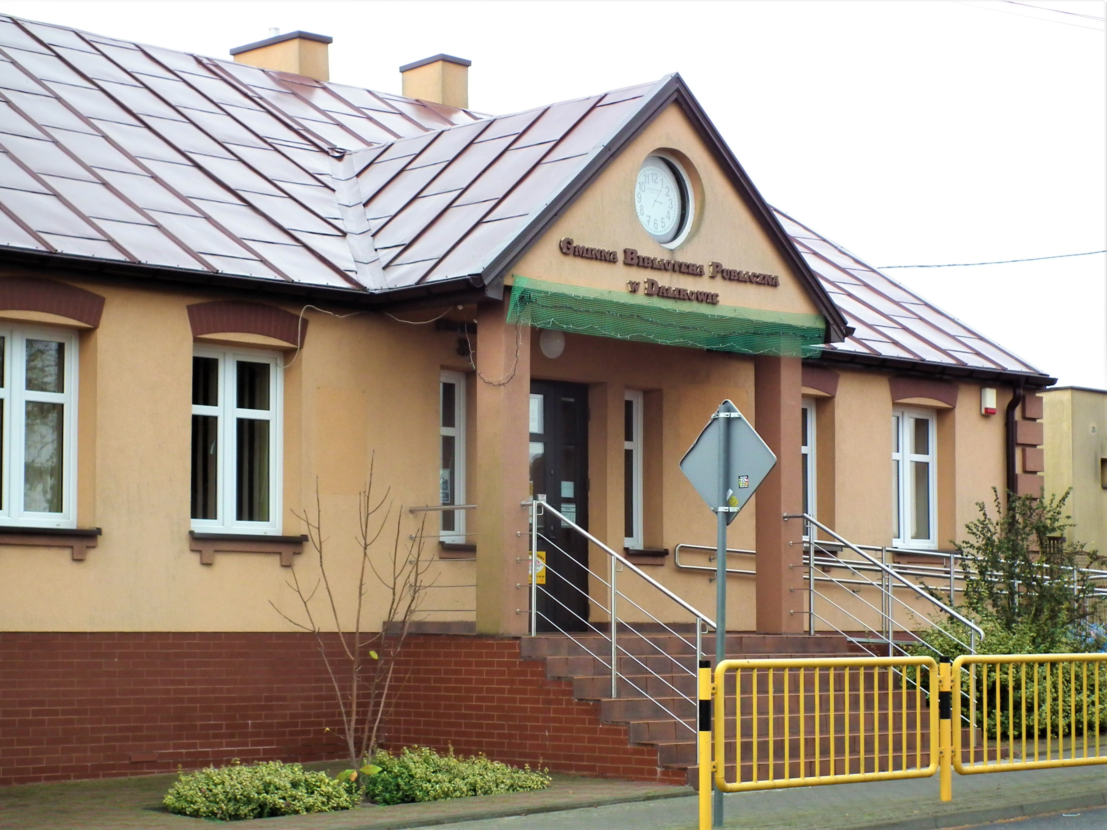 Dalików.